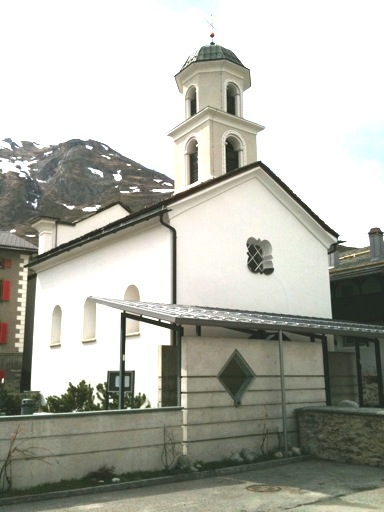 reformierte Kirche Bivio, Kanton GraubündenRumantsch: Baselgia reformada Beiva, cantung Grischun